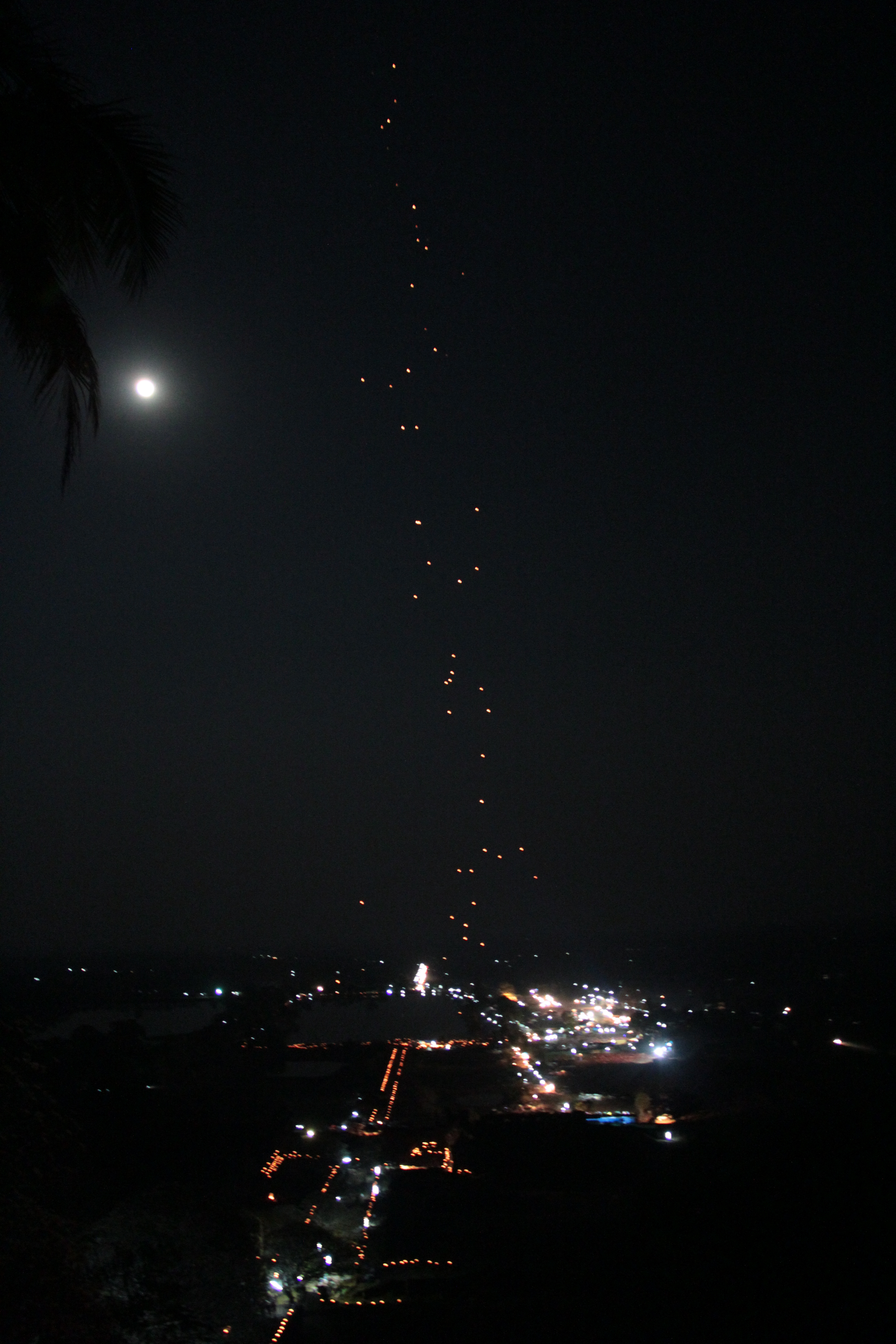 Lancer de lanternes célestes lors de Bun Wat Phou (Wat Phou Champasak, Laos).